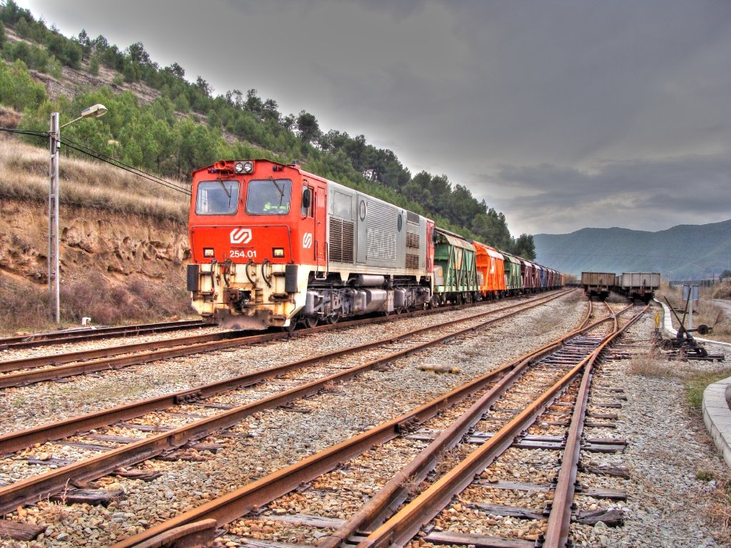 La 254.01 arriba a la platja de vies de la mina de Súria amb un tall de tremuges. La 254.01 llega a la playa de vías de la mina de Súria con un corte de tolvas.